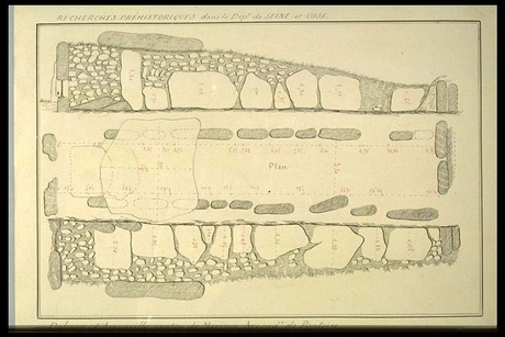 plan de l'Allée couverte de la côte du Libéra